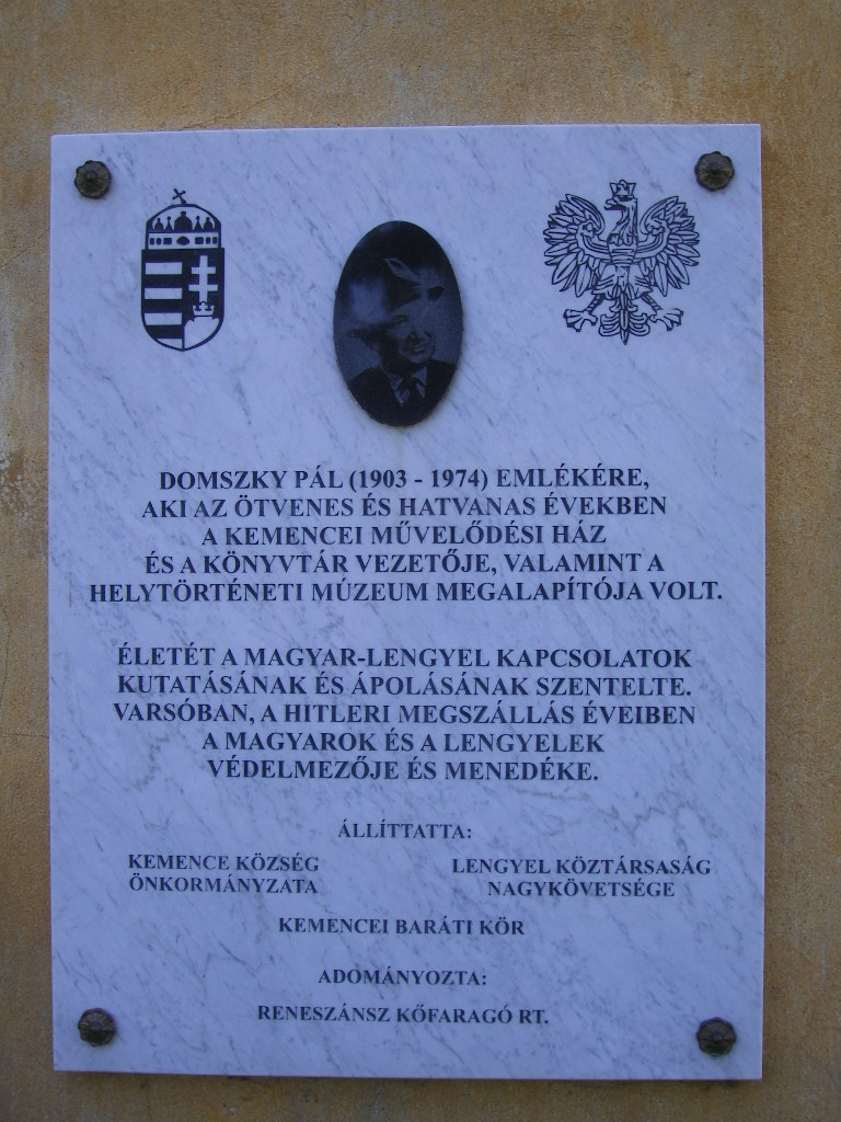 Kemence - Domszky Pál emléktáblája az egykori vármegyeháza falán